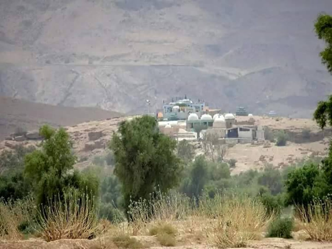 سید پیر گاجی شاہ کے مزار کا بیرونی منظر